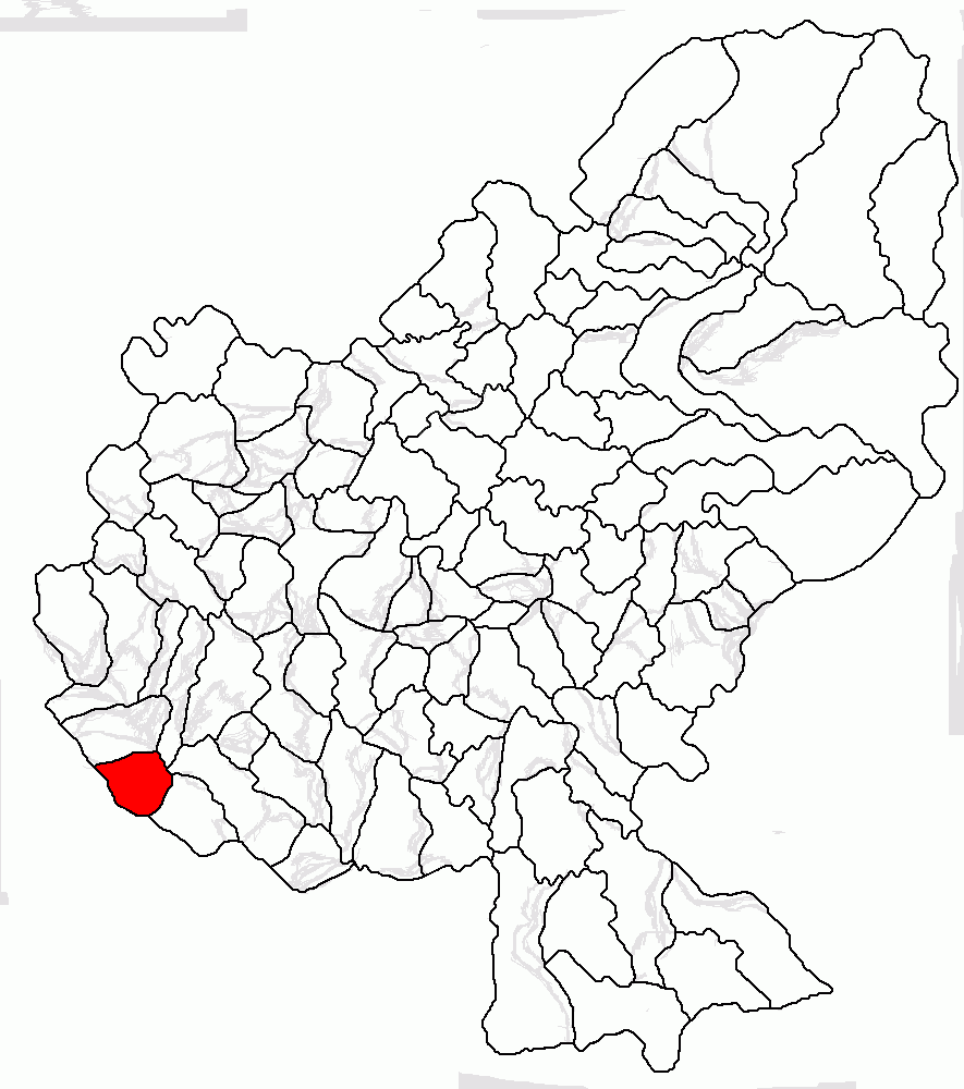 Categorie:Hărţi ale judeţului Mureş